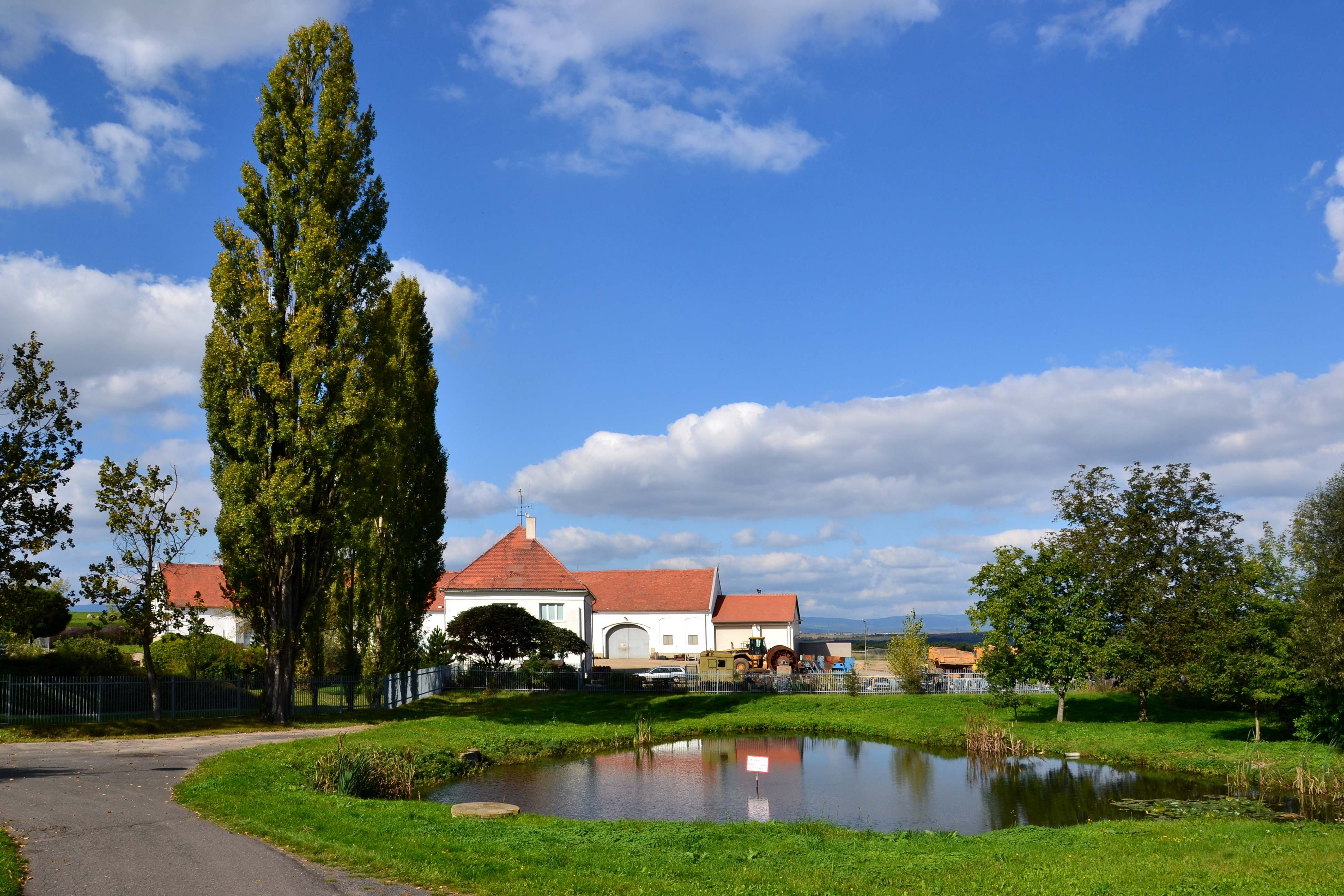 Roztyly - střed vesnice